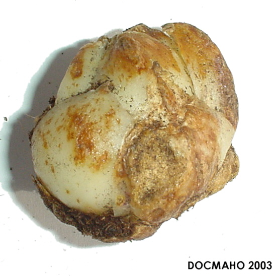 Lilium duchartrei bulb